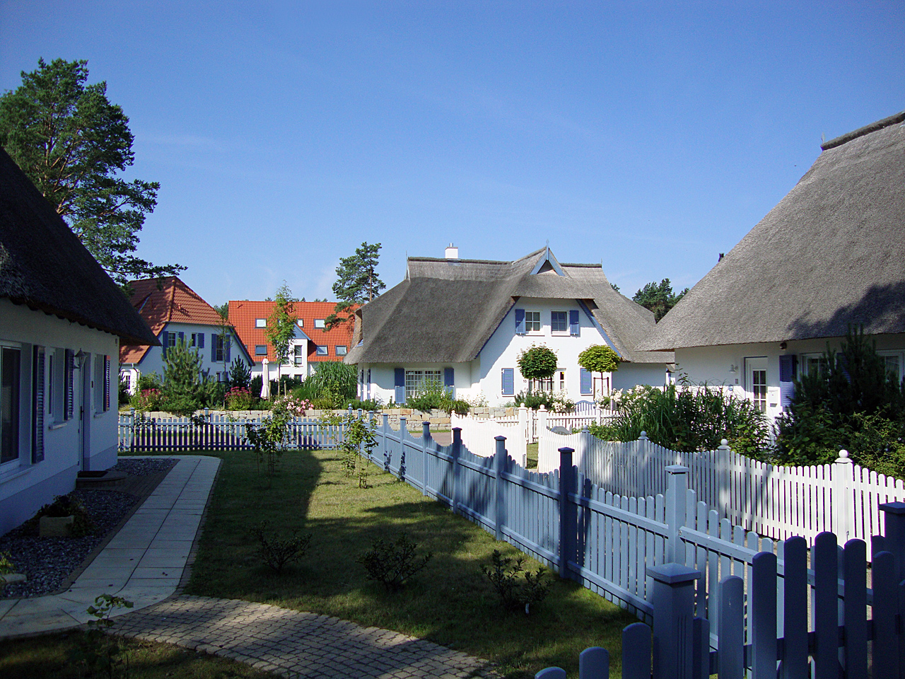 Karlshagen, Ferienhäuser in der Dünenresidenz, 2009